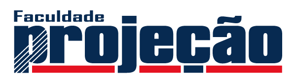 LOGO PROJEÇÃO